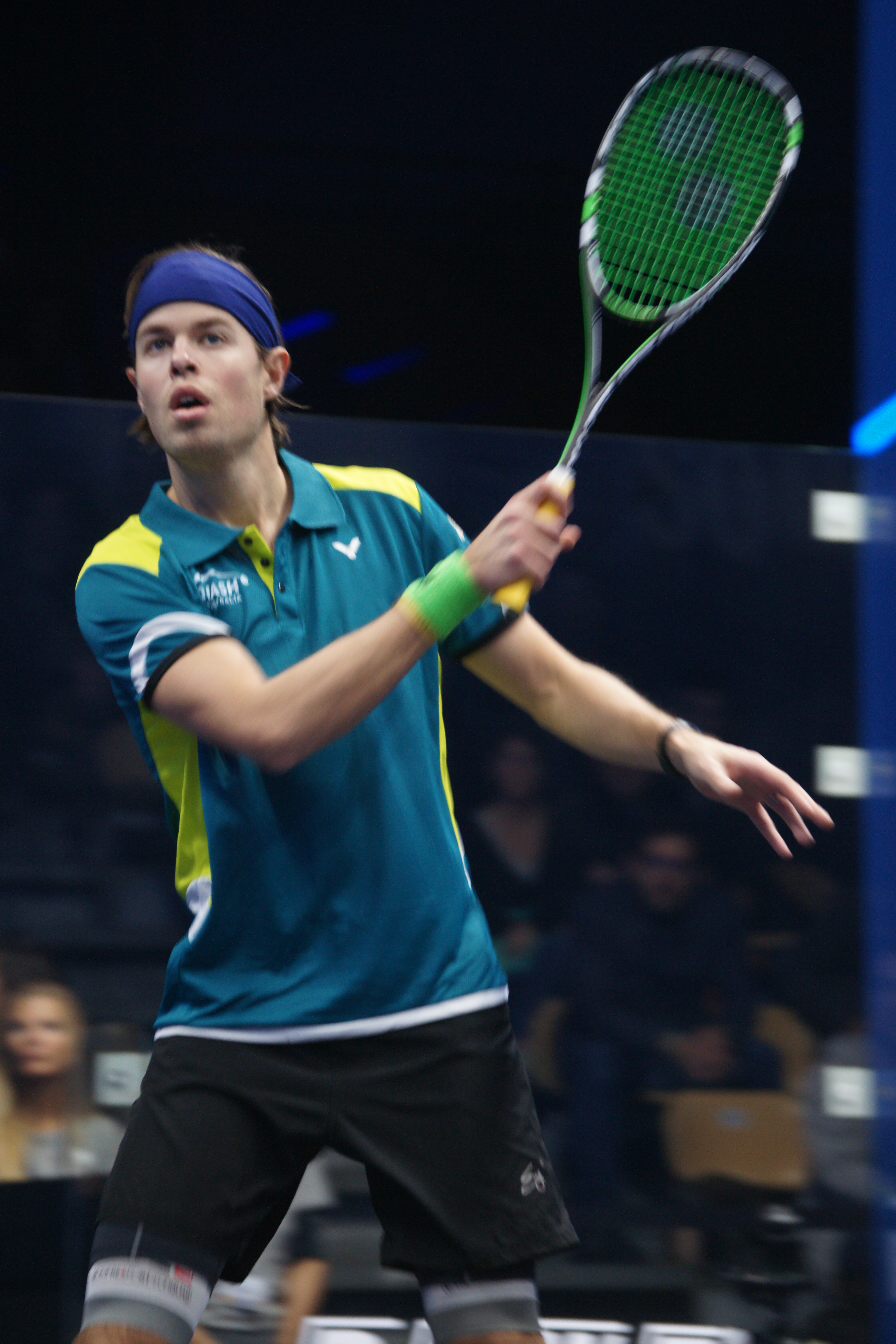 Zac Alexander, championnats du monde de squash par équipe Marseille 2017